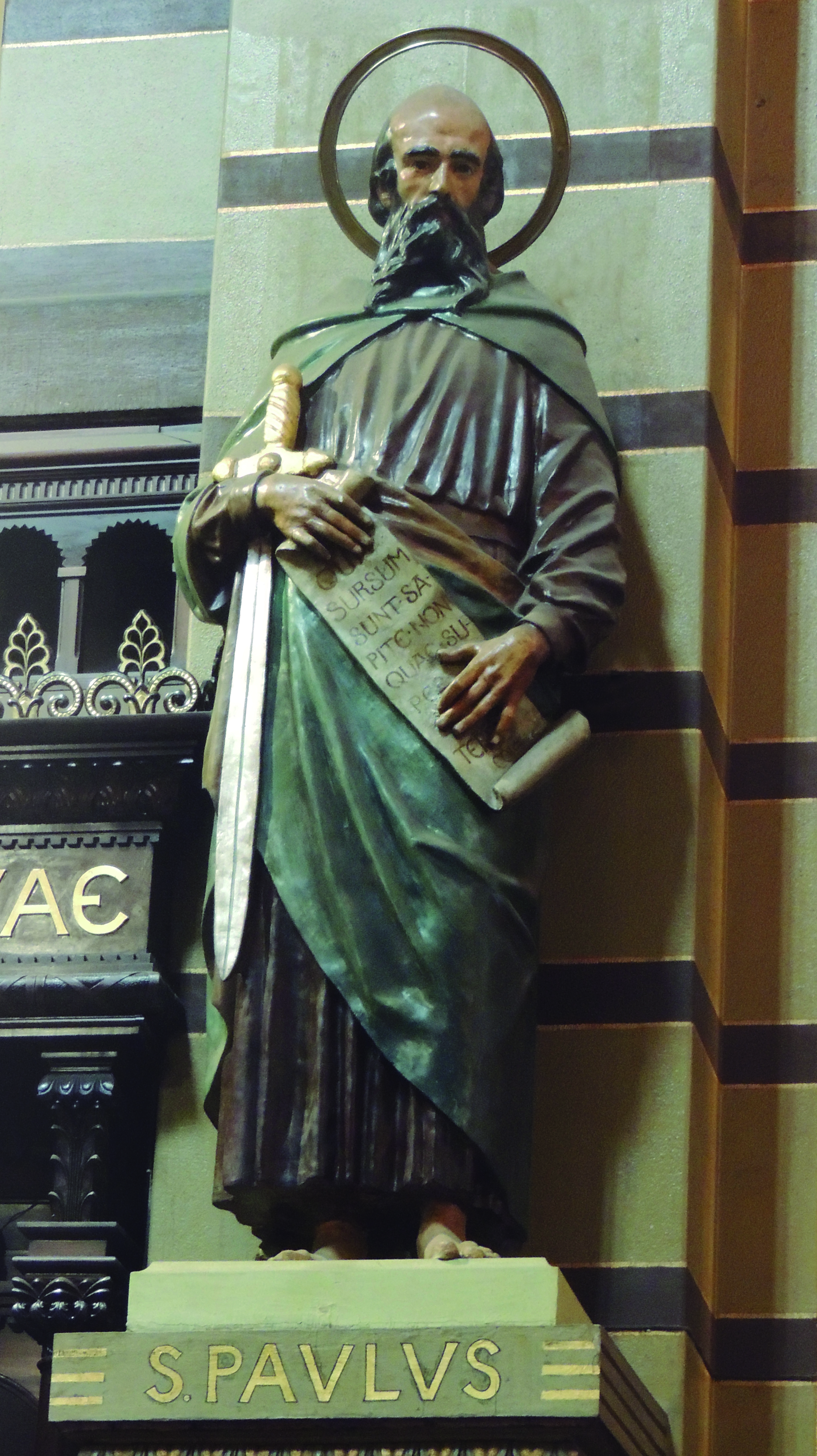 Integra um conjunto de estátuas da Basílica de Nossa Senhora da Assunção do Mosteiro de São Bento na cidade de São Paulo.Os apóstolos têm cerca de 2,80 m de altura, são feitos de gesso policromo e estão instalados na nave da igreja beneditina, a uma altura de aproximadamente 3,5 m. Moldadas por Van Emelen em seu ateliê no Palácio das Indústrias, São Paulo, entre 1920 e 1922, as estátuas teriam sido inauguradas no dia da consagração da basílica, em 1922.